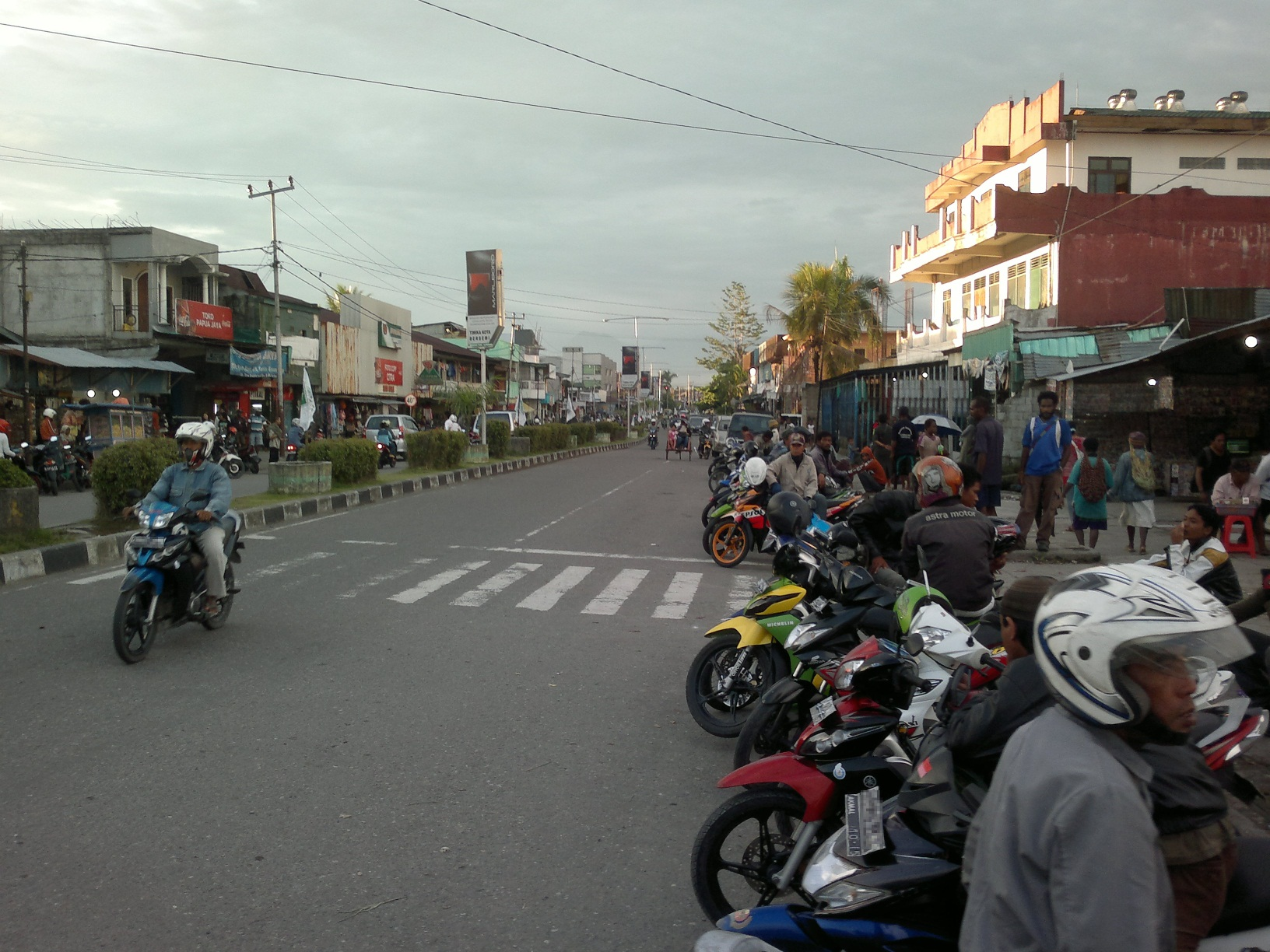 Street scene in Timika, Papua